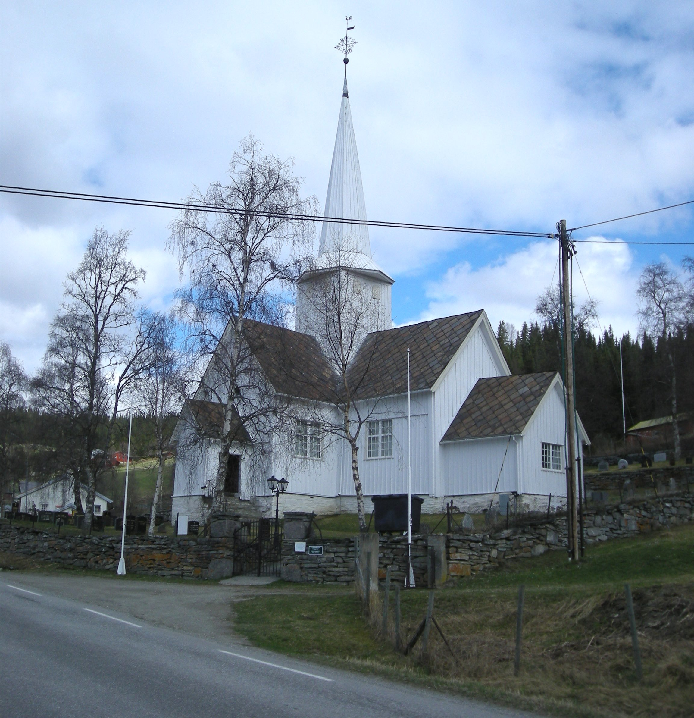 Primær fylkesvei 27 går forbi Venabygd kirke i Ringebu kommune.